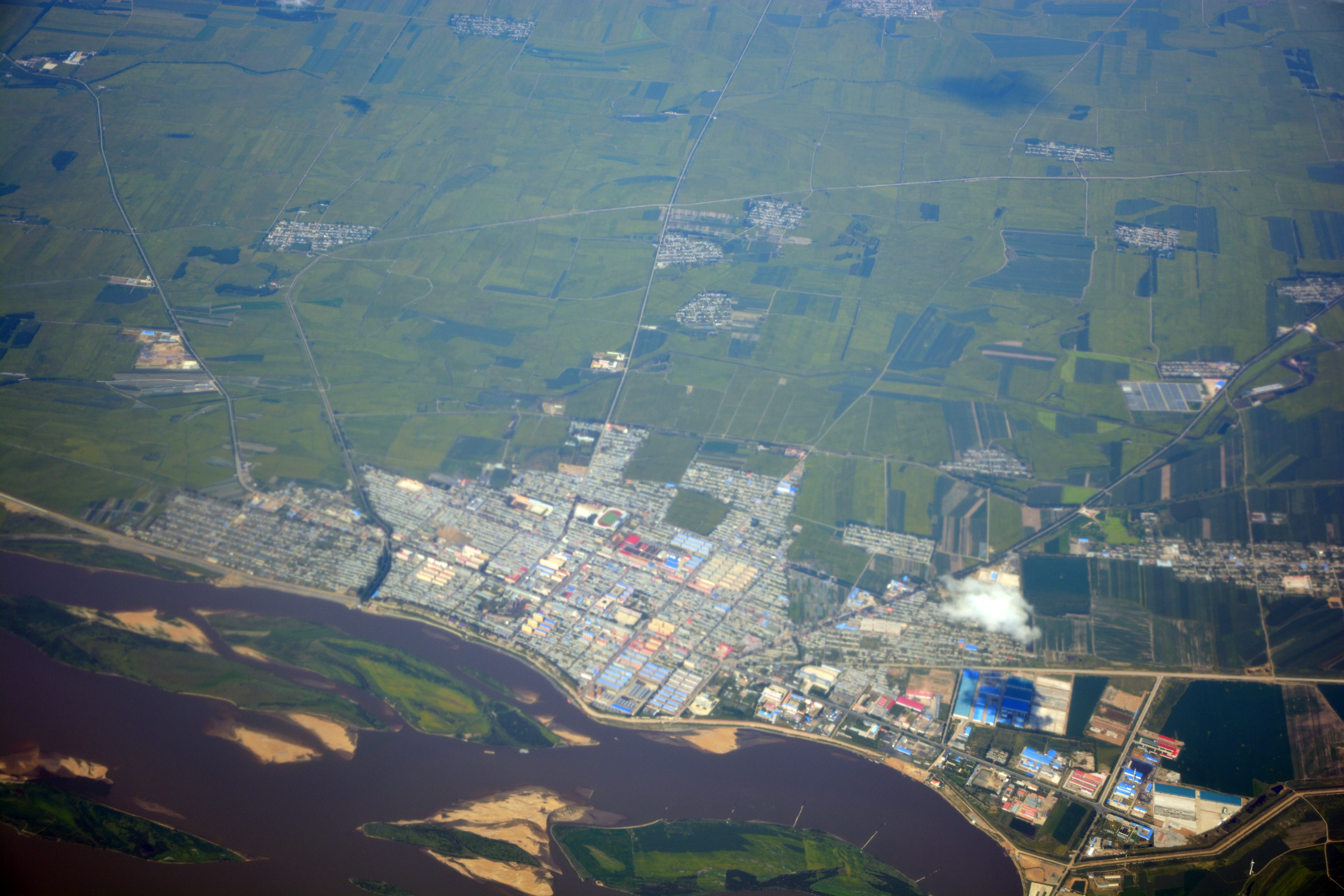 中华人民共和国黑龙江省鹤岗市绥滨县